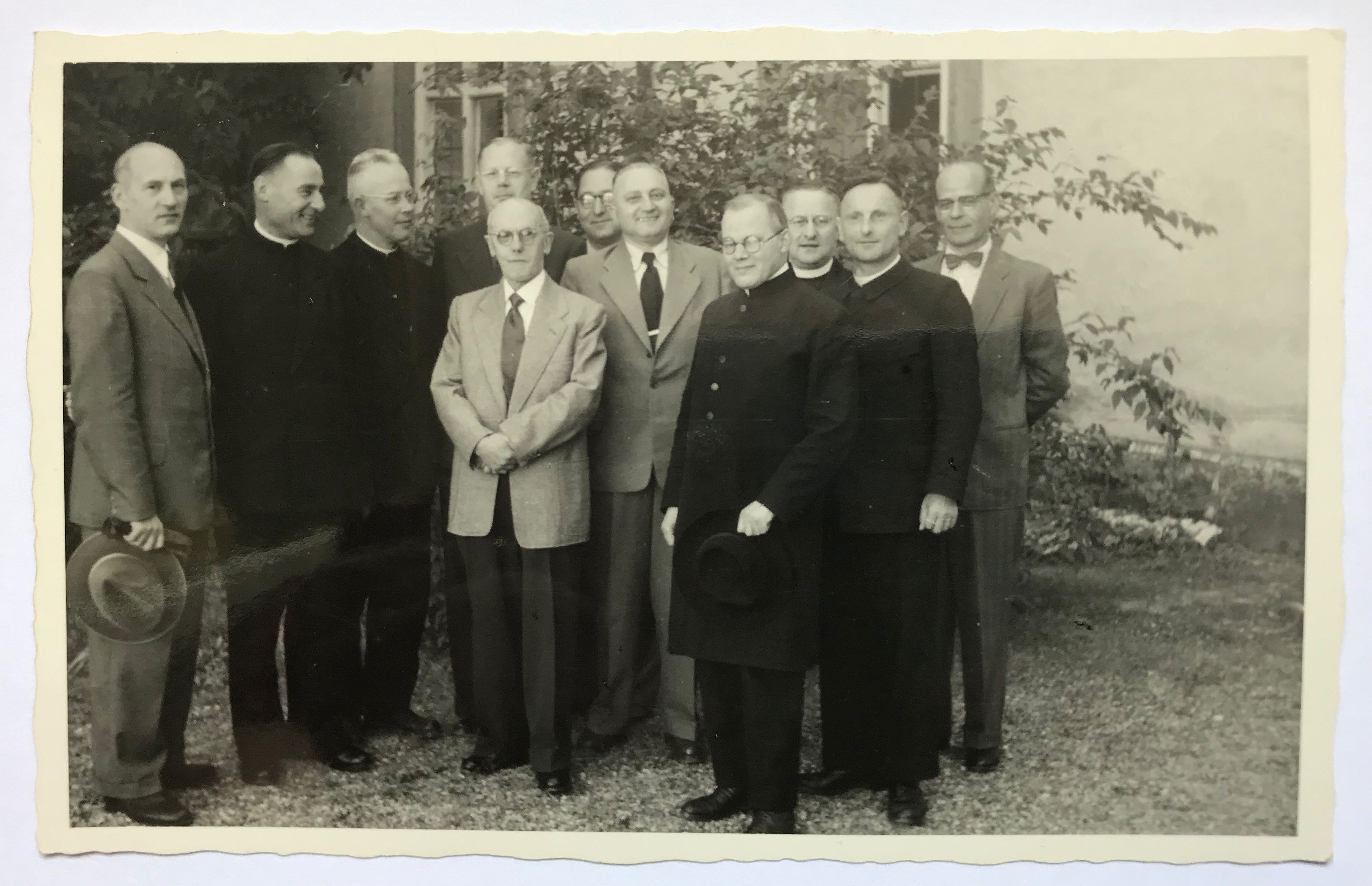 Foto von Prof. Dr. Max Lebsche (Vorne Mitte/Zentrum im hellem Sakko) während eines "Ehemaligentreffen" der KBStV Rhaetia München. ca. 1955. Abfotografiert vom Originalabzug. Keine Retusche